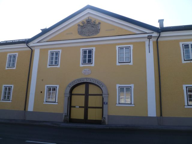 Stieglbräu-Stallungen